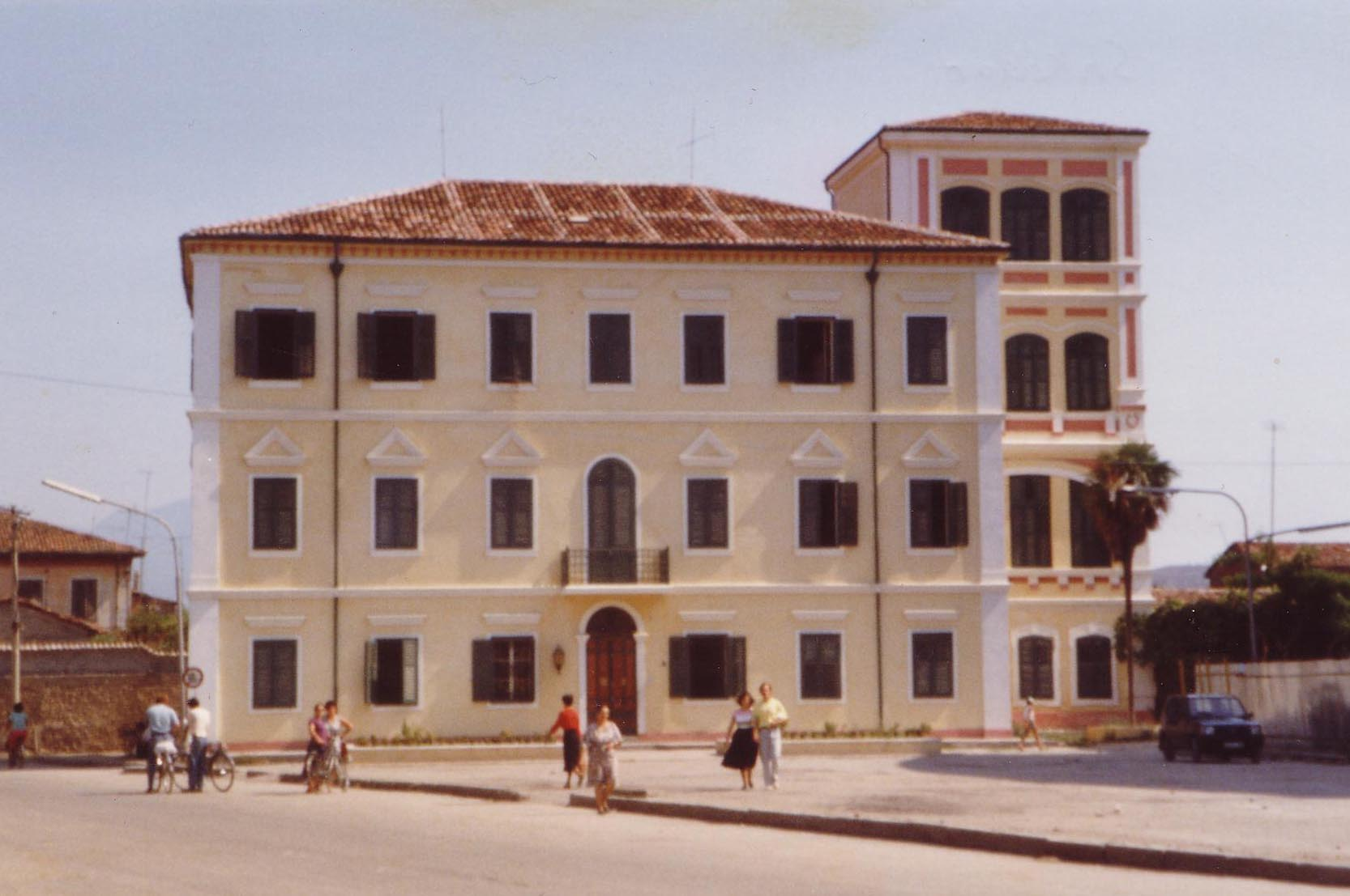 Jesuitenkolleg in Shkodra (Albanien)